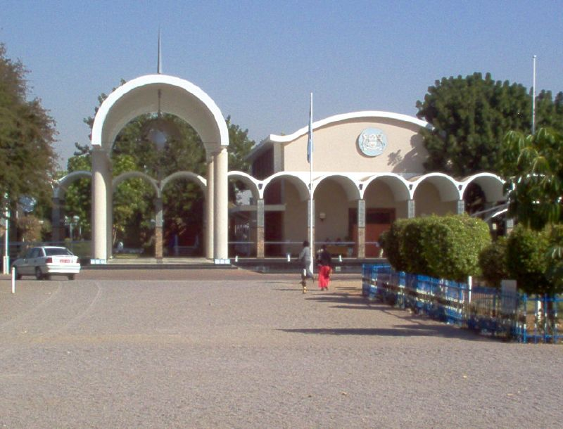 Im000964.Jpg